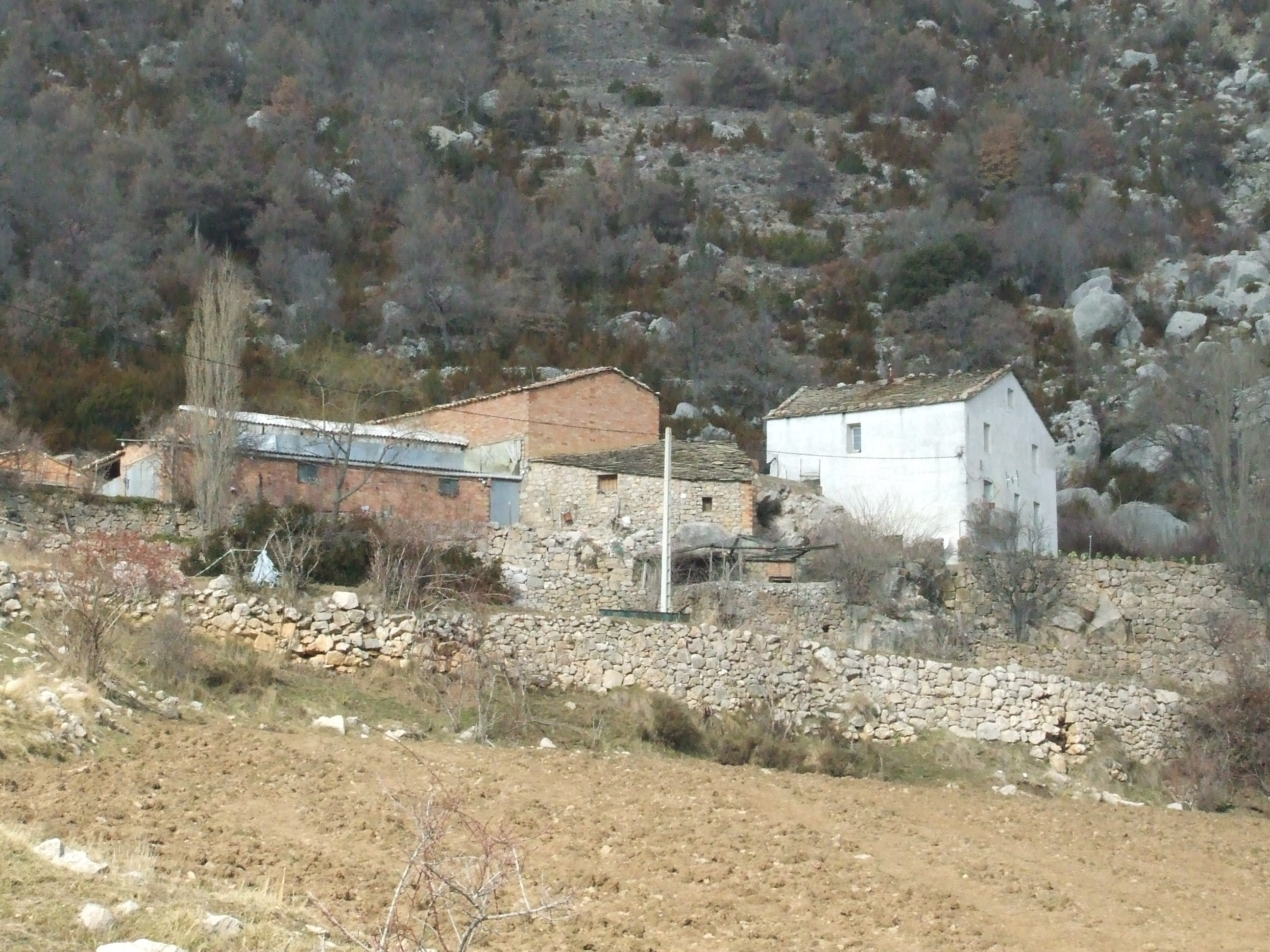 Cal Mascarell (Bóixols, Abella de la Conca, Palla Jussà)